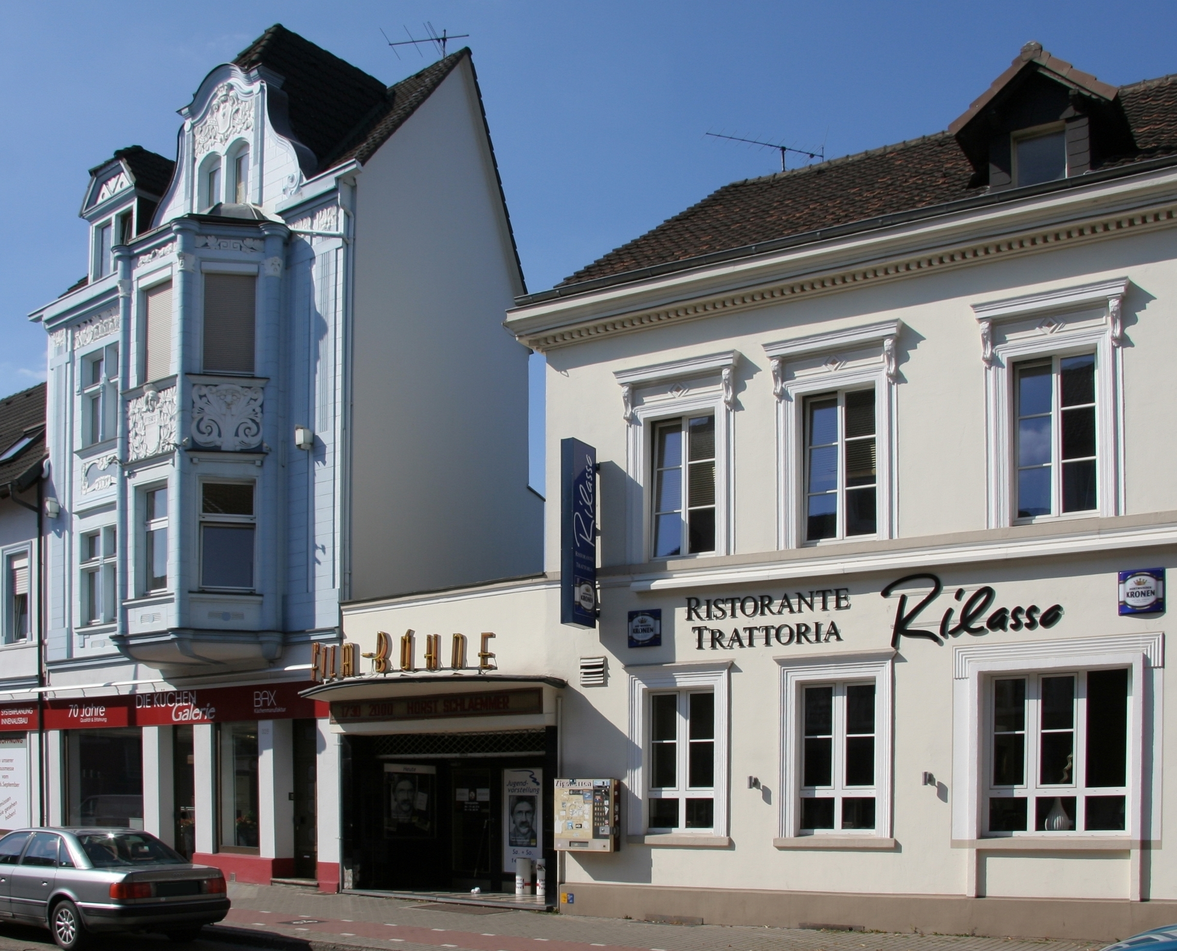 Kino in Dortmund Aplerbeck